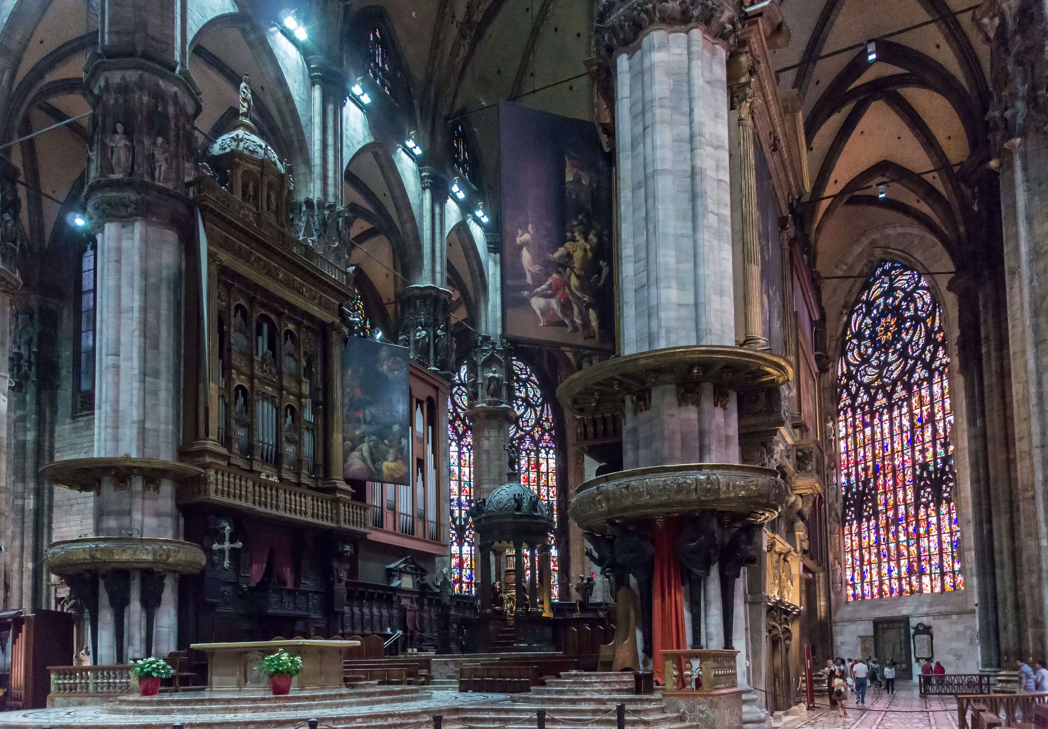 Net et Choeur de la cathédrale